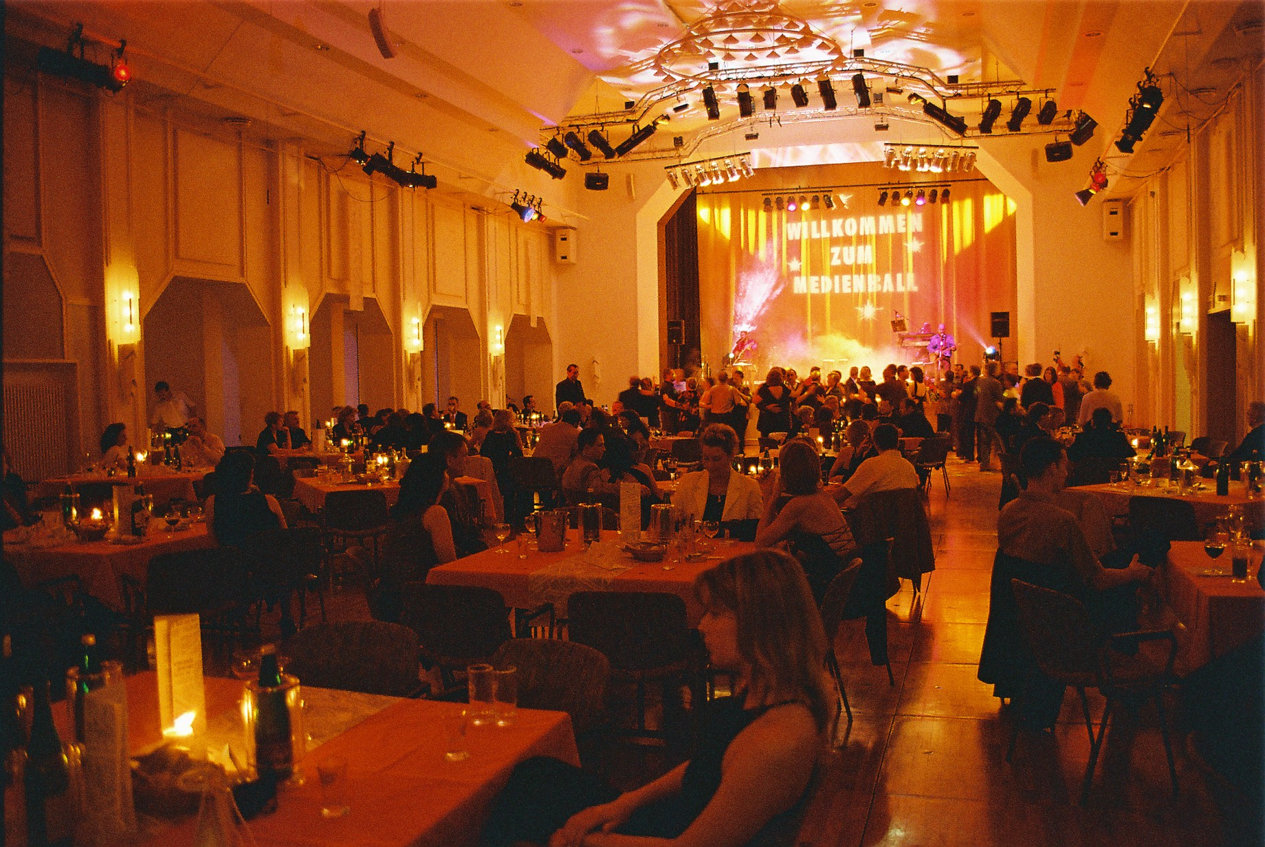 Schuppen-innen-medienball